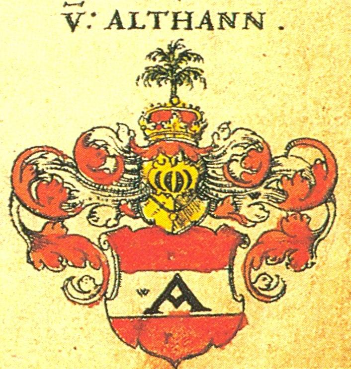 Wappen der }Freiherrn von Althann nach Siebmacher